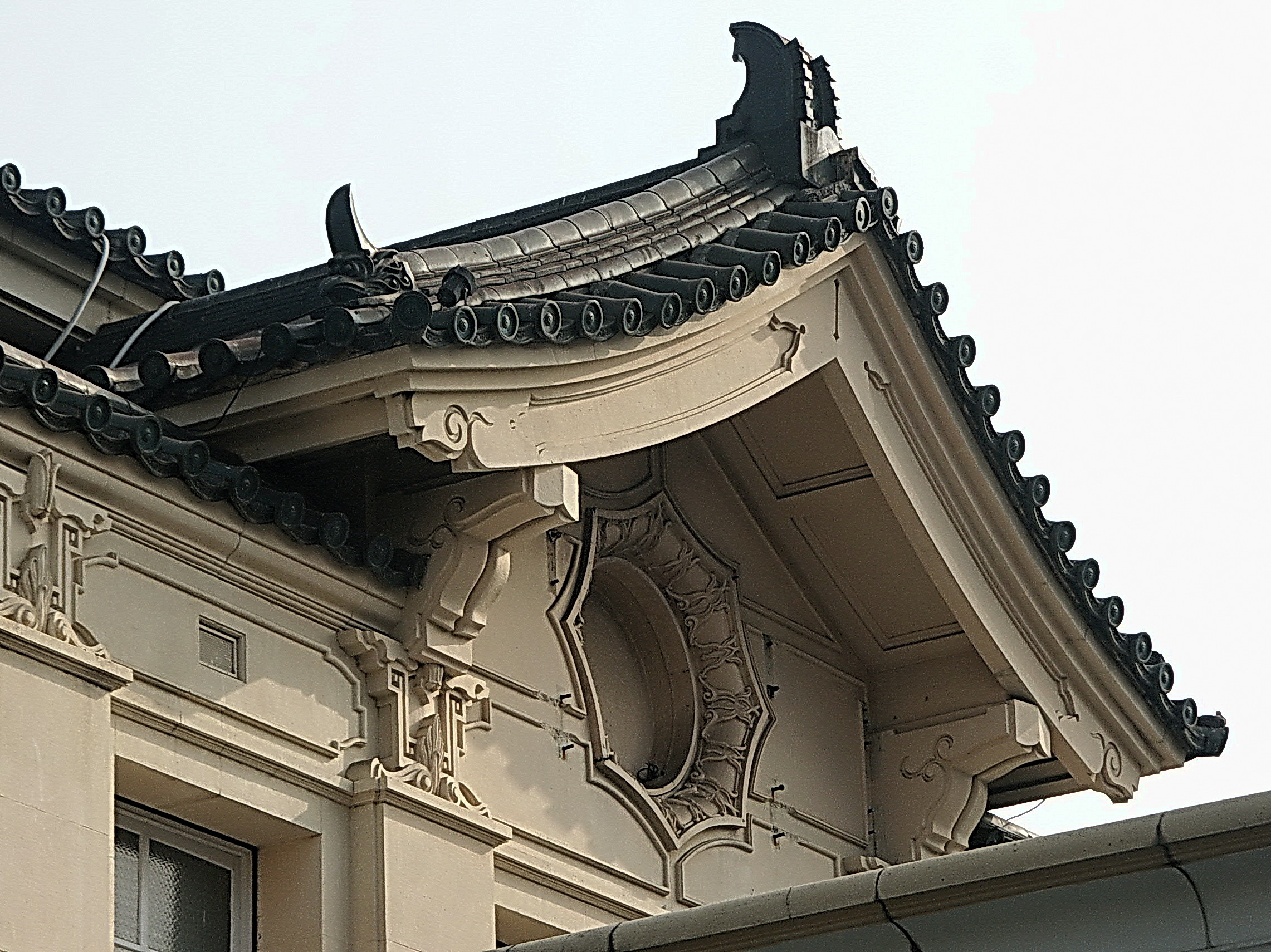 高雄舊火車站 Kaohsiung Old Station